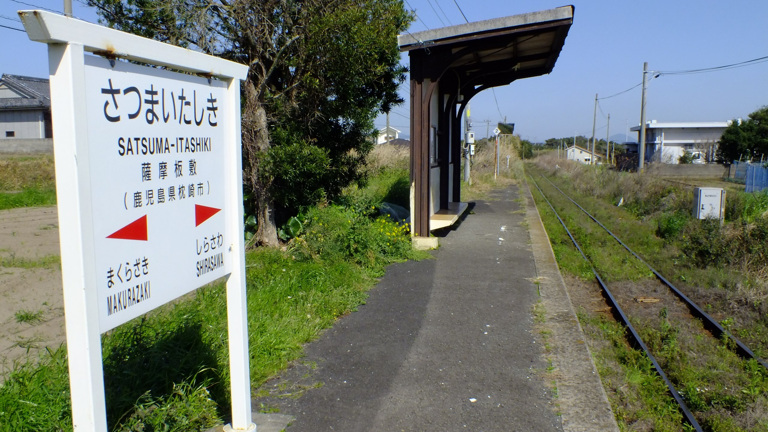 薩摩板敷駅のホーム（2019年3月）